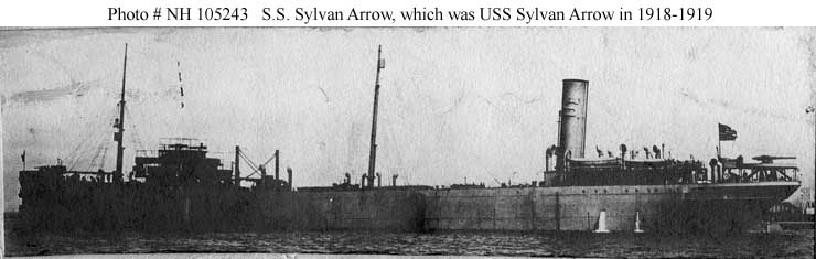 Der Kommerzielle Tanker SS Sylvan Arrow zum Zeitpunkt ihrer Fertigstellung im Januar 1918, vor ihrem Dienst in der United States Navy.